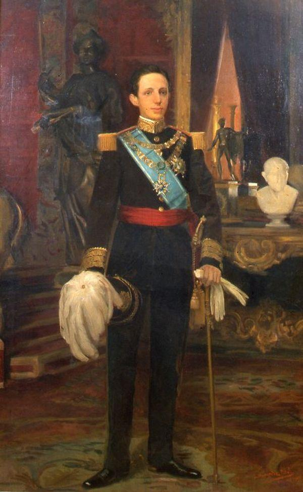 Retrato del rey Alfonso XIII (1886-1941), vestido con uniforme de capitán general y portando el collar de la Orden del Toisón de Oro.